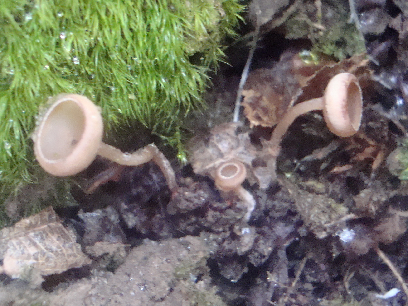 Houba jehnědka olšová z Podkomorských lesů, Česká republika, jižní Morava